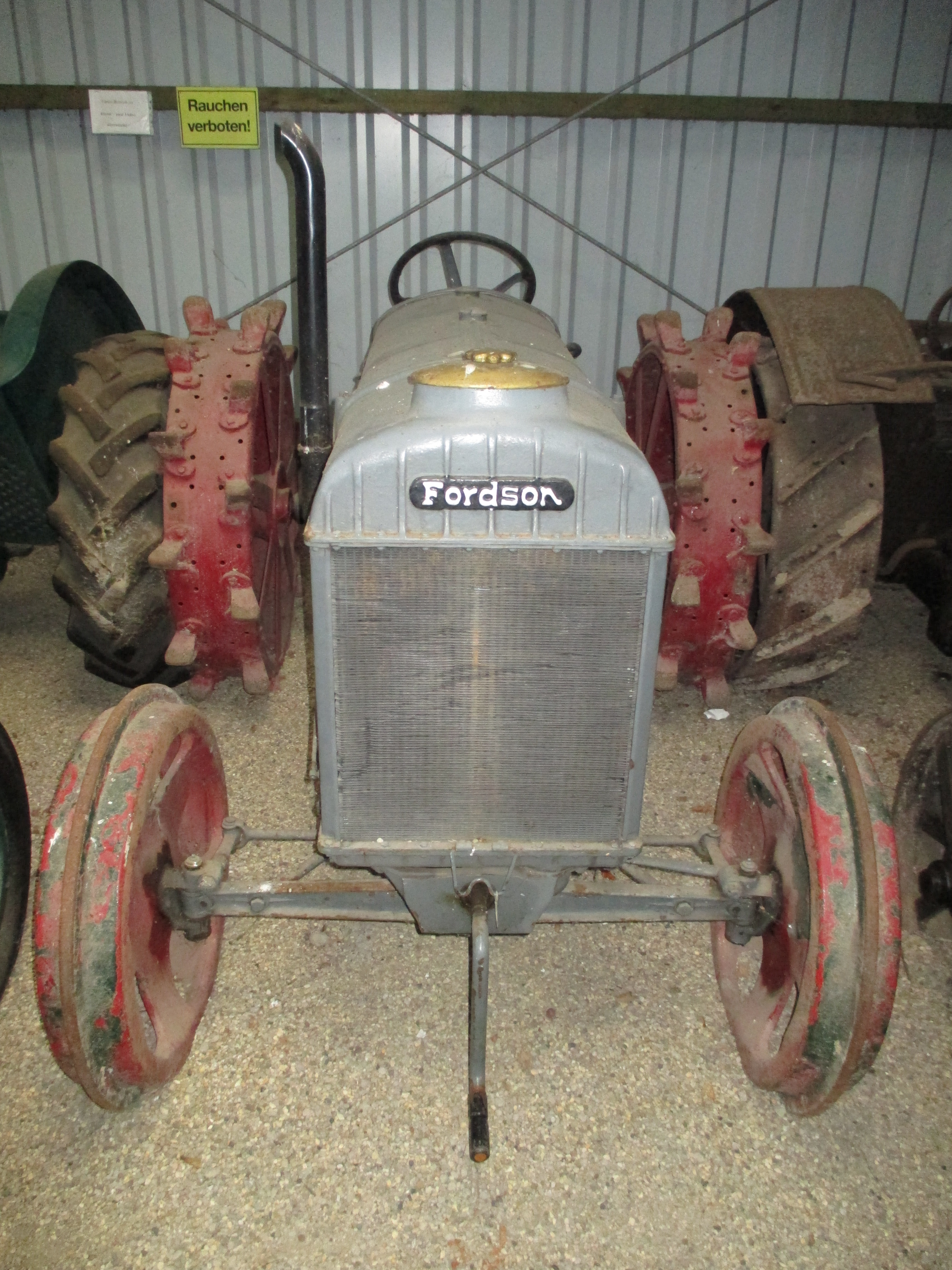 Traktoren und Landmaschinen im Traktorenmuseum Pauenhof: Ford Ltd "Fordson", Baujahr: 1927